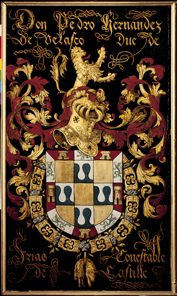 schilder uit Valenciennes; vermoedelijk Jacques Le Boucq, Blazoen van het 23ste Gulden-Vlieskapittel, 1559, Pedro Hernandez de Velasco; inv: 433 N.171